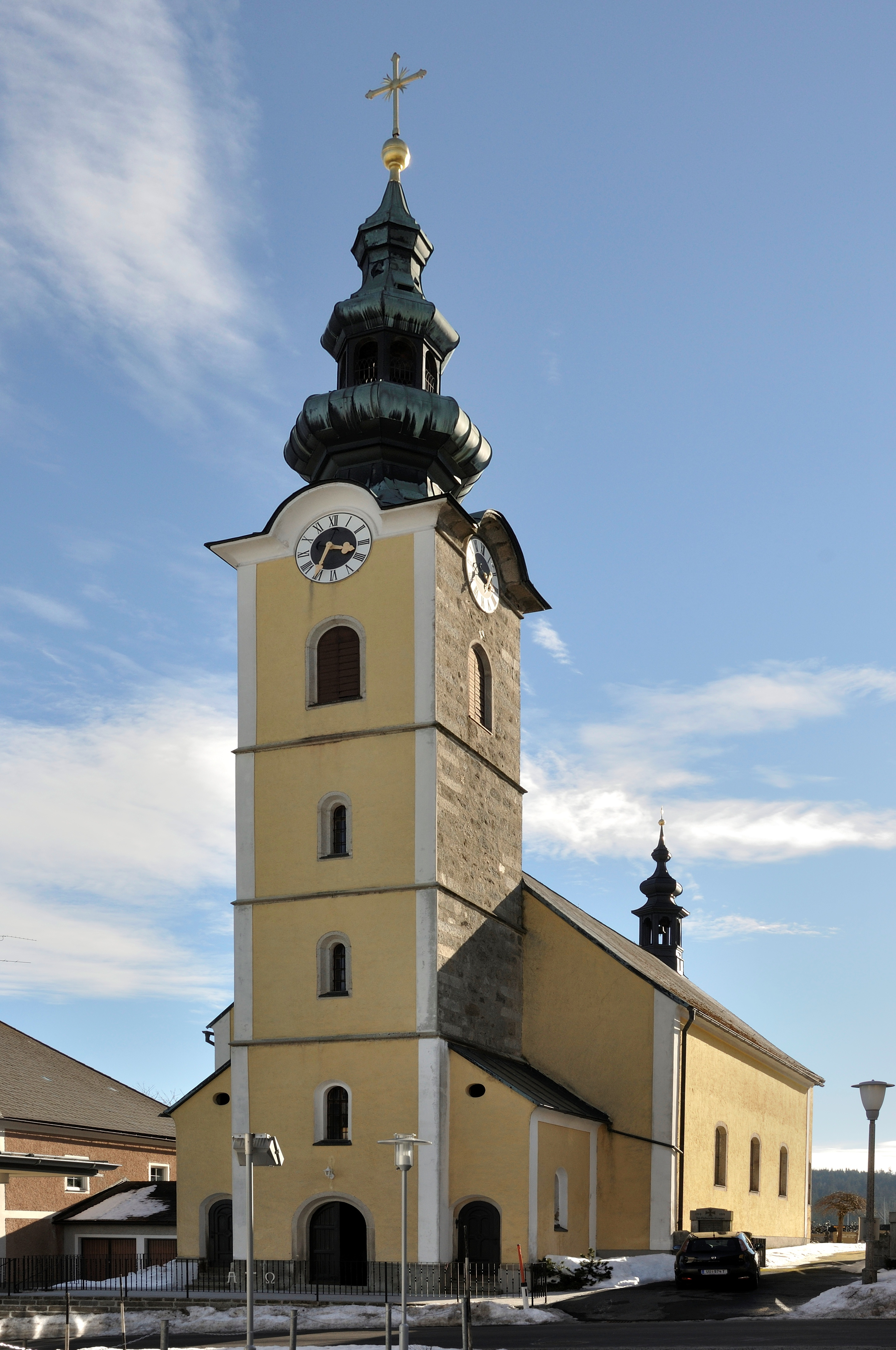 Kath. Pfarrkirche hl. Josef der Arbeiter